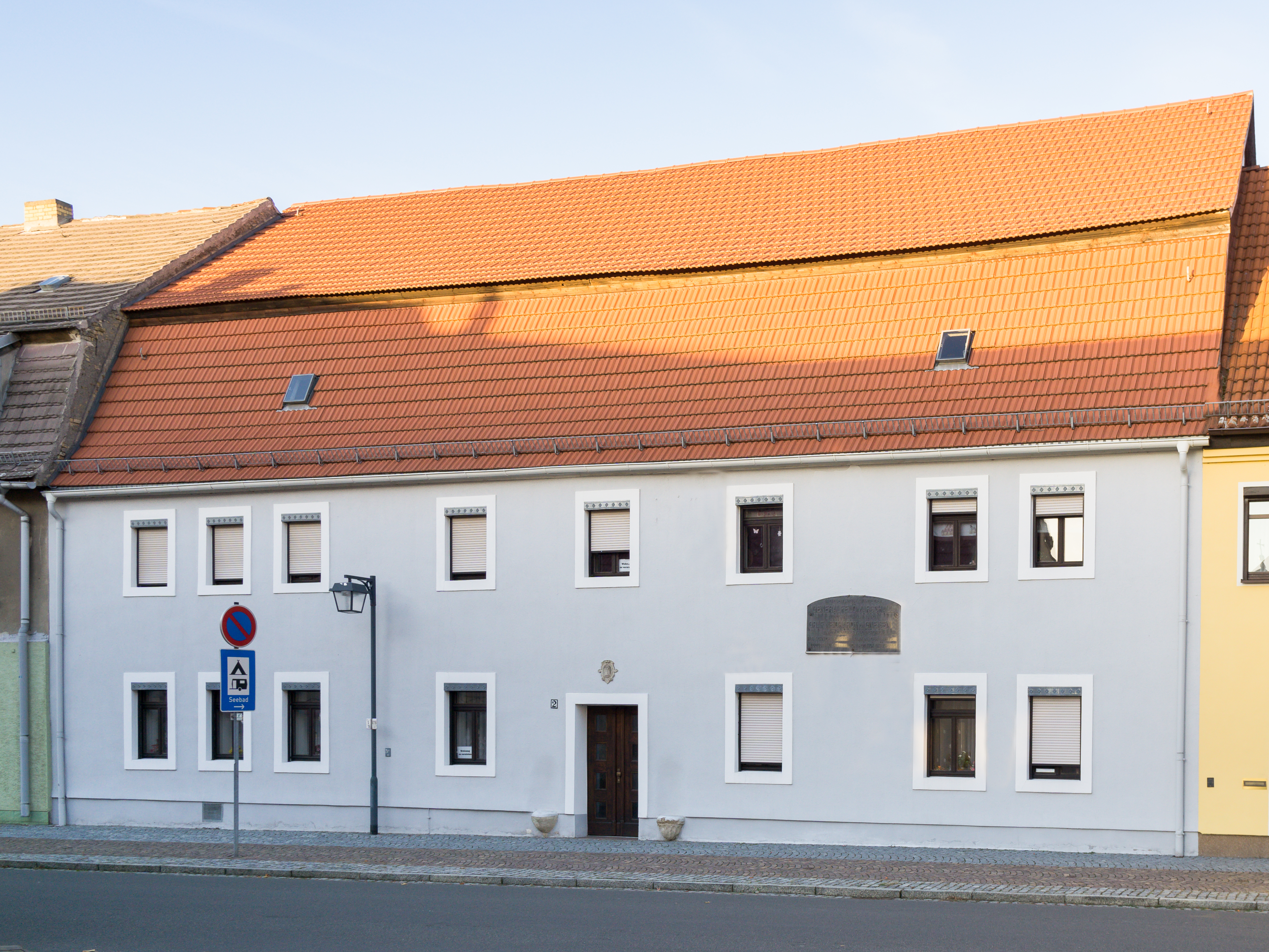 Ehemaliges Gasthaus, (Geburtshaus Graf Neidhardt von Gneisenau) Gneisenaustraße 2 in Belgern-Schildau OT Schildau